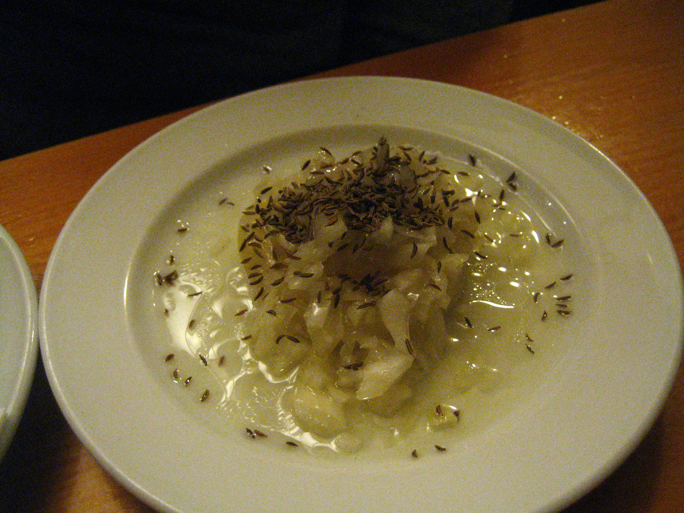 Fromage fort de Béthune, dem Handkäse verwandte Käsespezialität aus der Région Nord-Pas-de-Calais